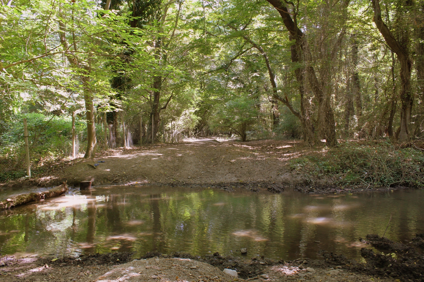 Хачмазский район Азербайджана, зога отдыха Набрань.